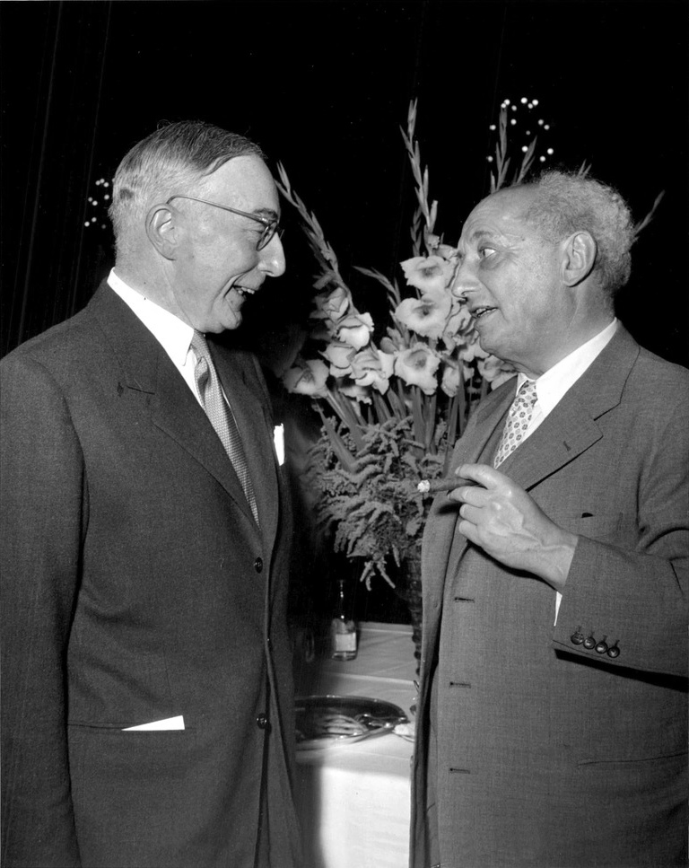 Läkarkongress på Stadshuset. Borgarrådet Harald Mårtens och danske professorn Erik Warburg.